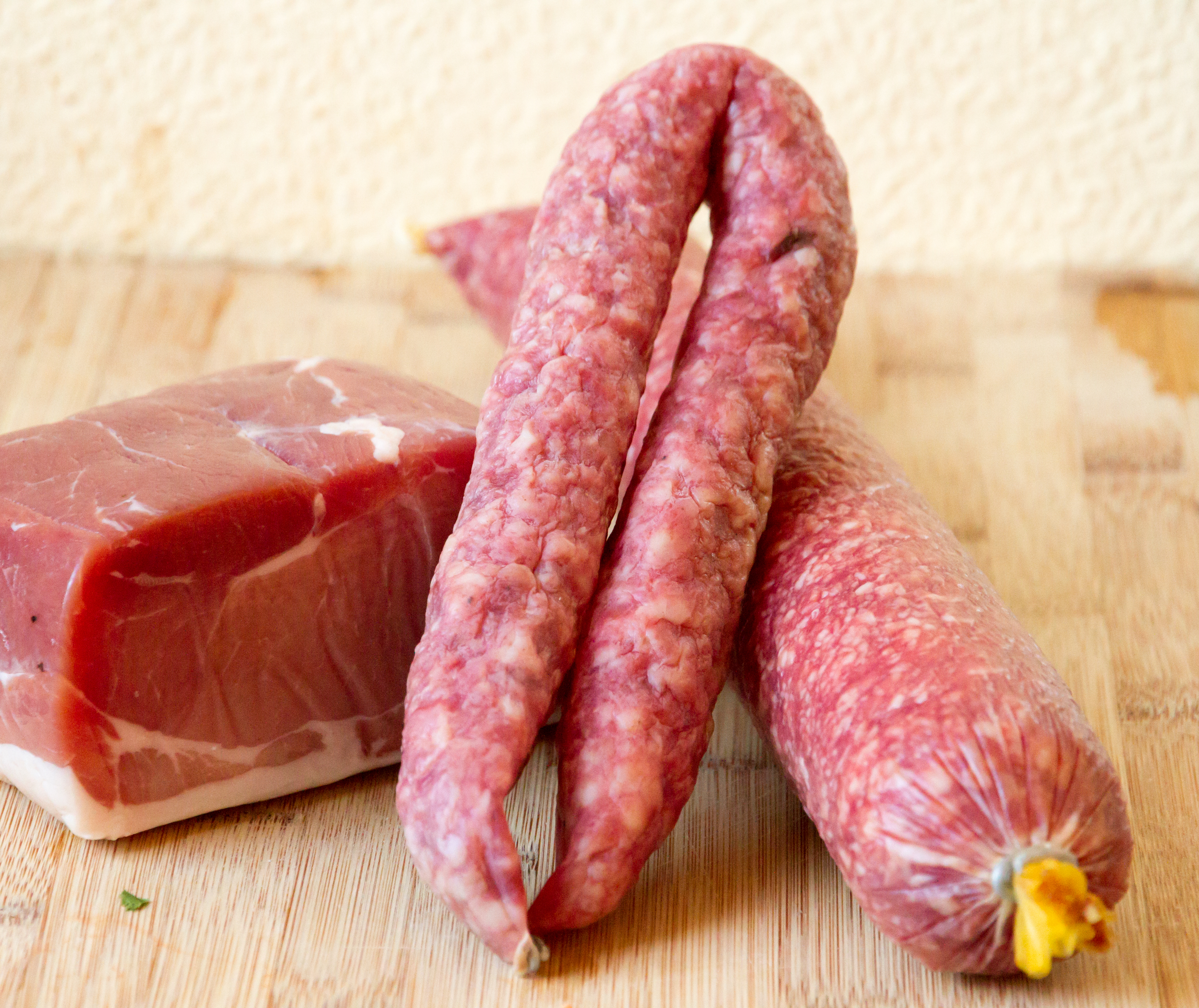 Luftgetrockneter Schinken, Mettwurst und Pümmel